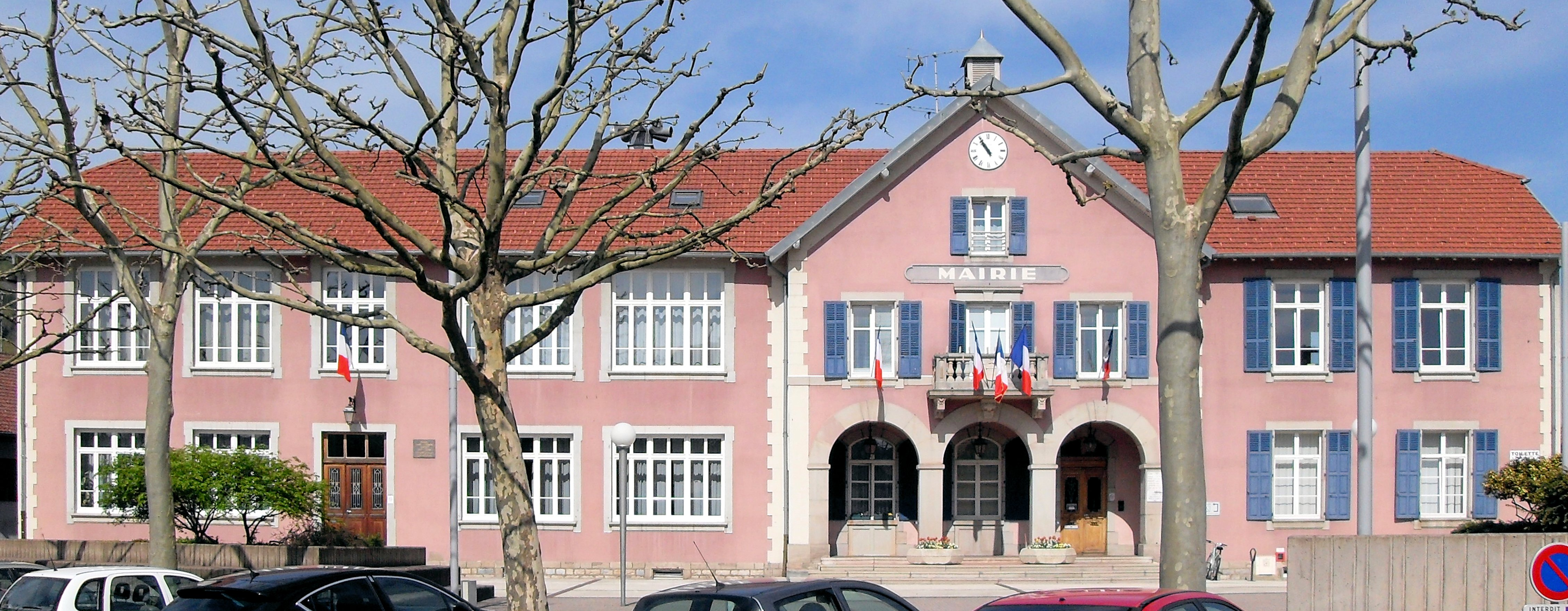 La mairie de Valdoie